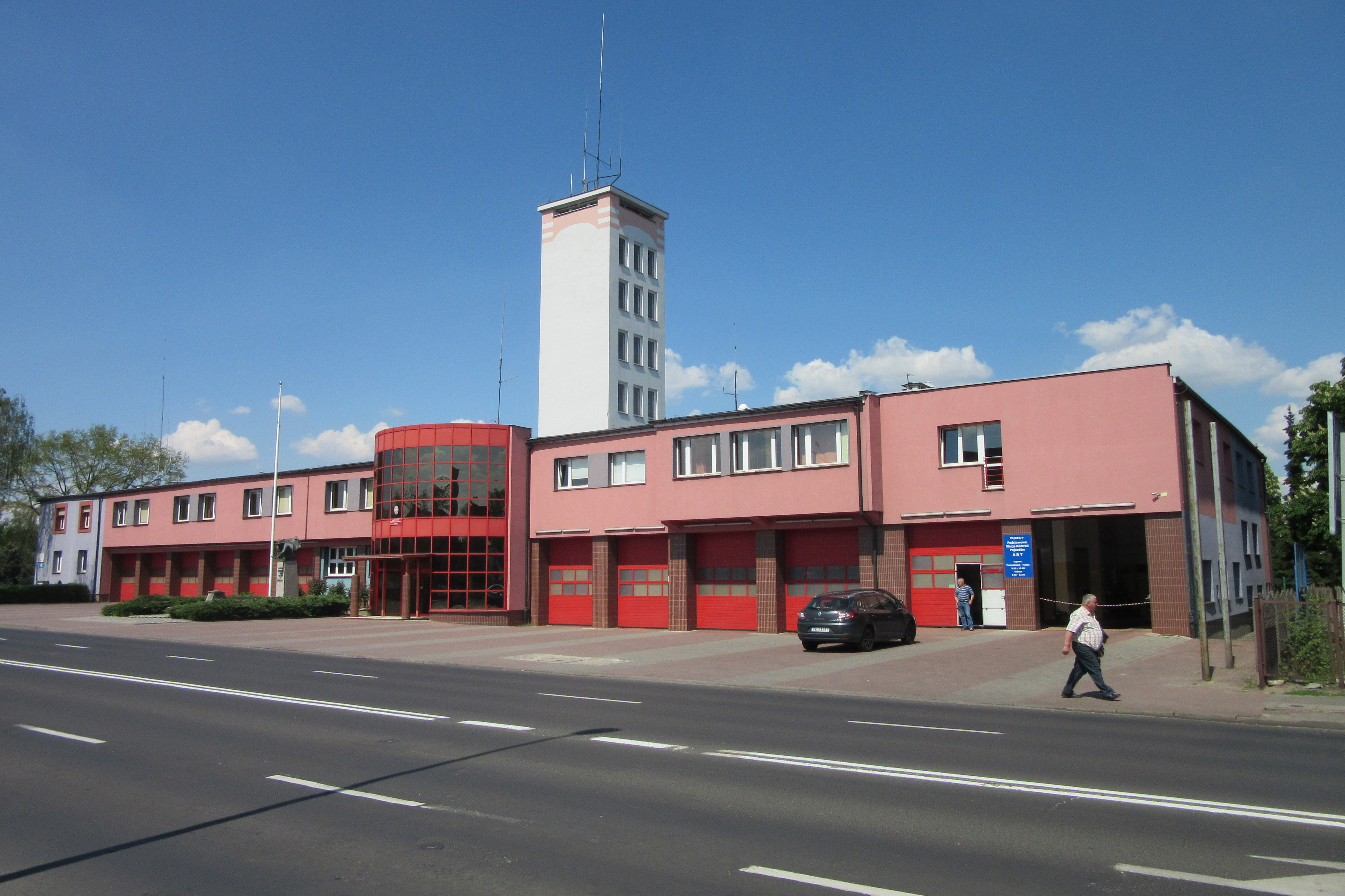 Komenda Miejska Państwowej Straży Pożarnej w Kaliszu